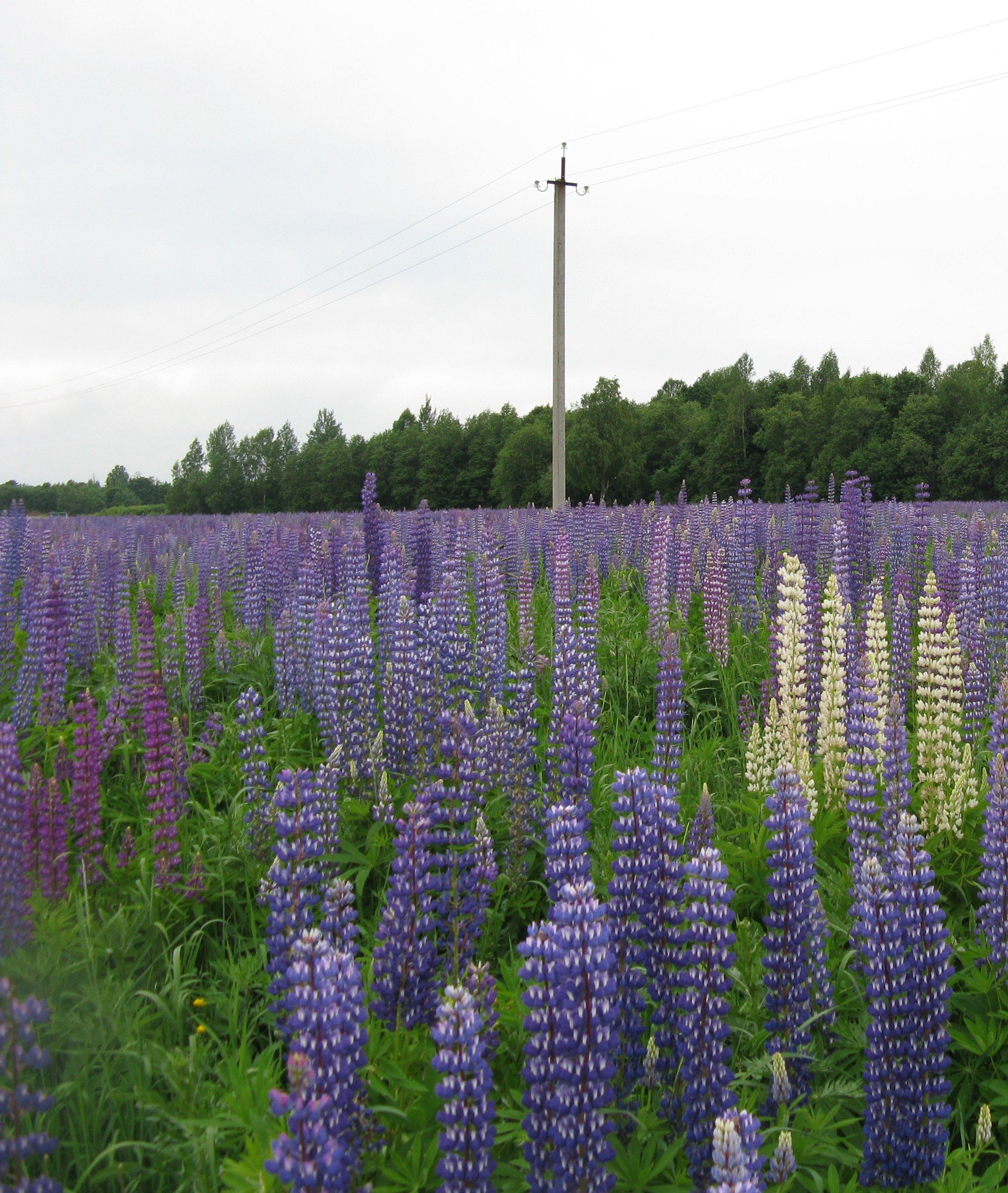 Люпин - простое для Гдовского района растение